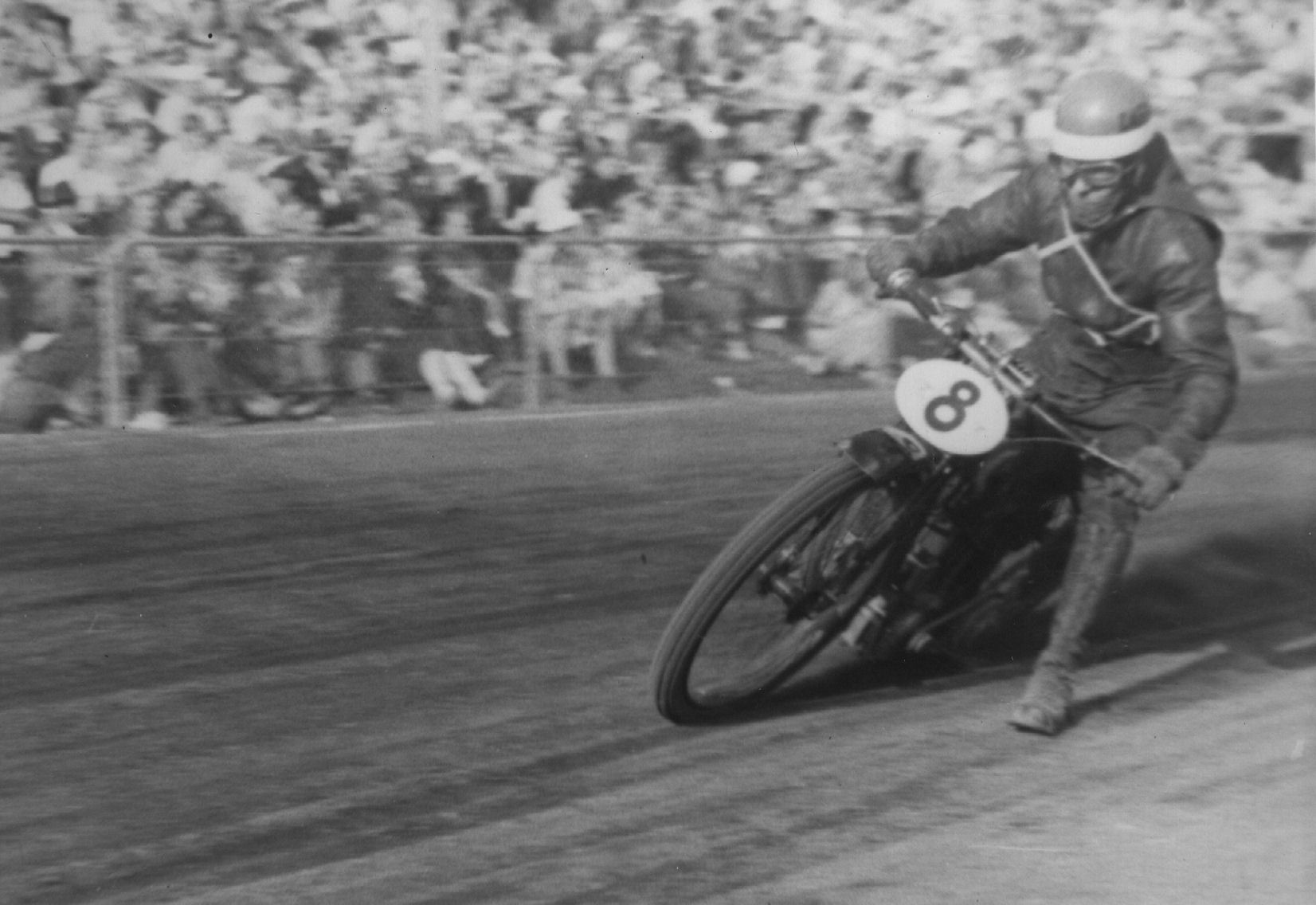 Svend Aage Sørensen på Gentofte Stadion 23.-8.-1947